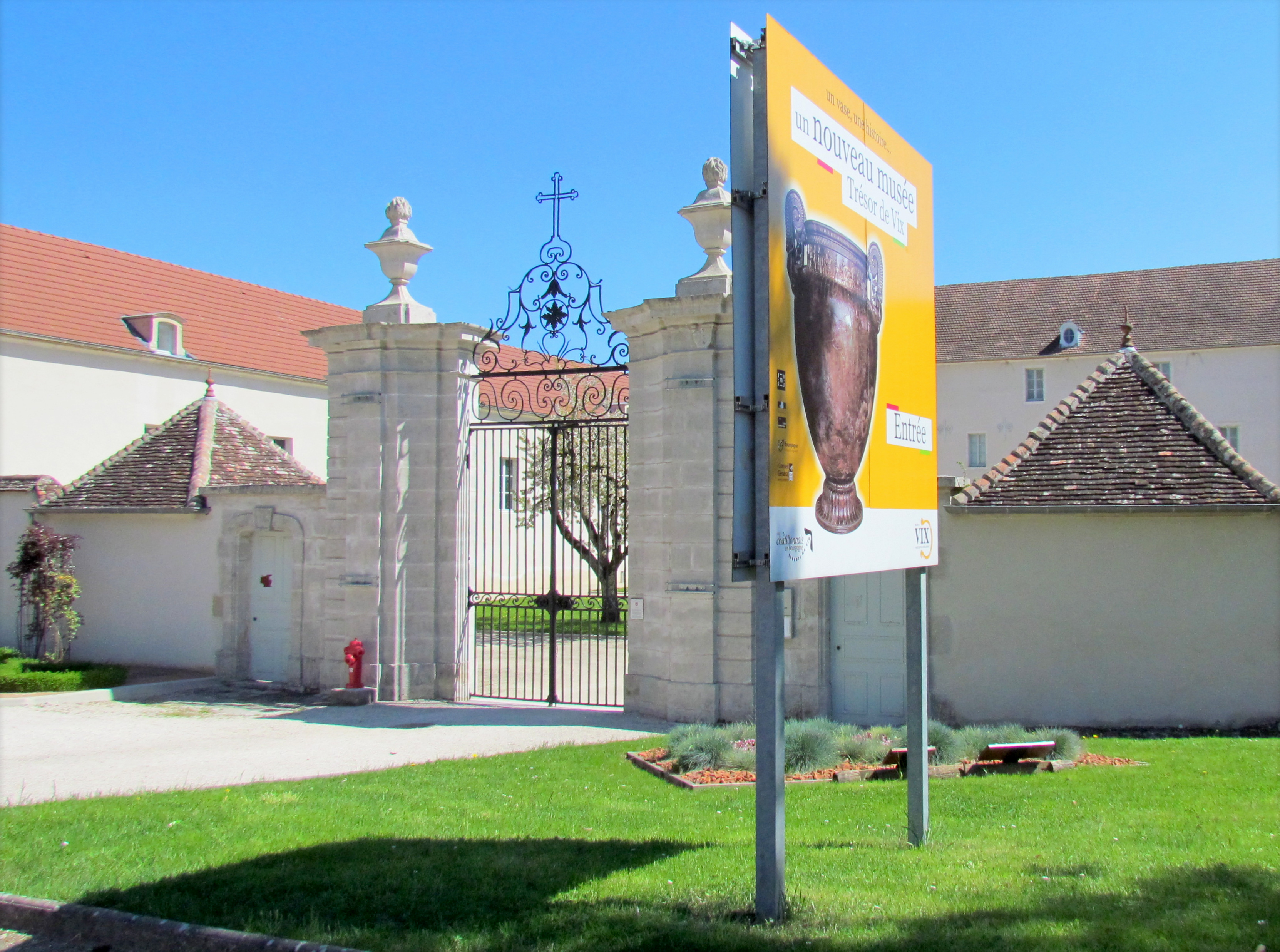 Entrée du musée de Châtillon-sur-Seine (21) .